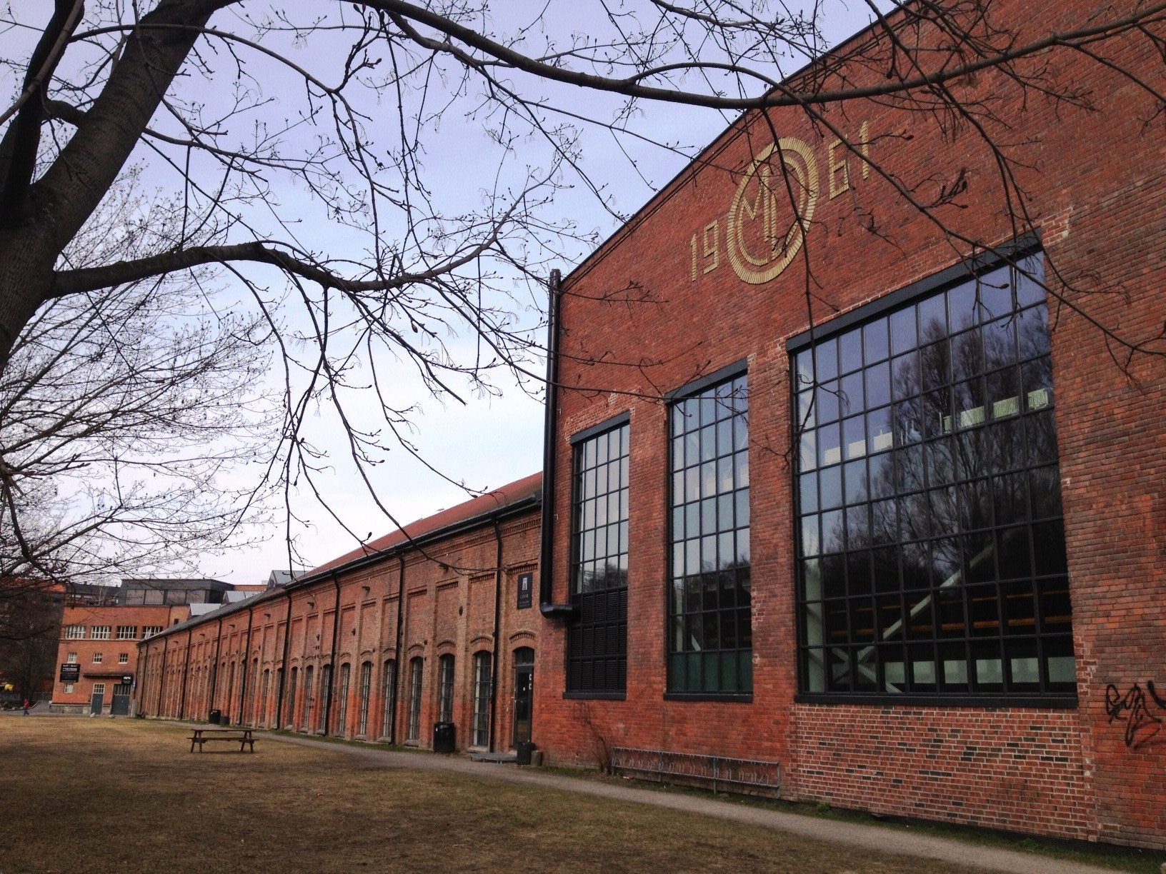 Næringslokaler på Myraløkka, oslo. Tidligere fabrikkbygninger, Myrens Verksted.